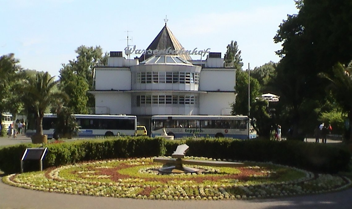 Beschreibung: Mülheim an der Ruhr: Wasserbahnhof mit Blumenuhr Quelle: Benutzer:W.wolny selbst fotografiert am 15. Januar 2005 2005-01-16 18:48:46 . . W.wolny (Diskussion) . . 1138 x 674 (146436 Byte) Lizenz